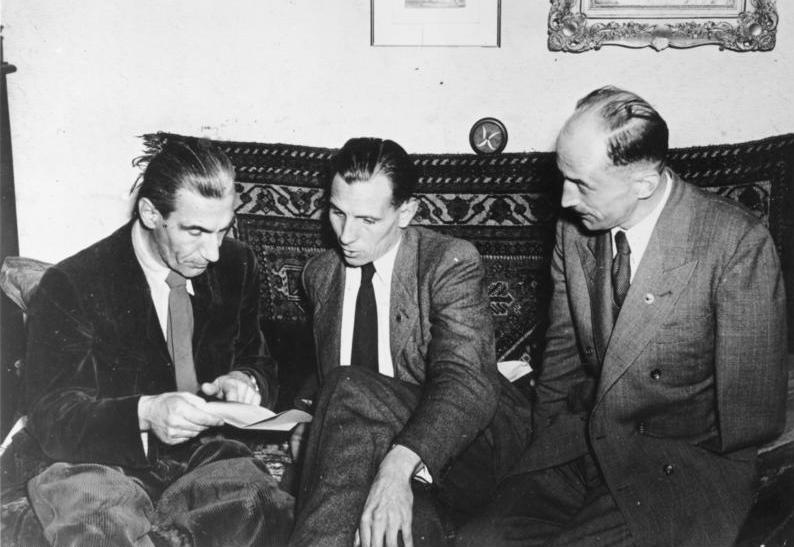 Zentralbild 14.8.1952 Die nazistische Führung der SRP (Sozialistischen Reichspartei). UBz: V.l.n.r. Der ehemalige Schulungsleiter einer NS-Ordensburg, 1. Vors. der SRP Dr. Dorls, der ehemalige Generalmajor Otto Ernst Remer, 2. Vors. der SRP und der ehemalige SS- und HJ-Führer Graf v. Westarp.